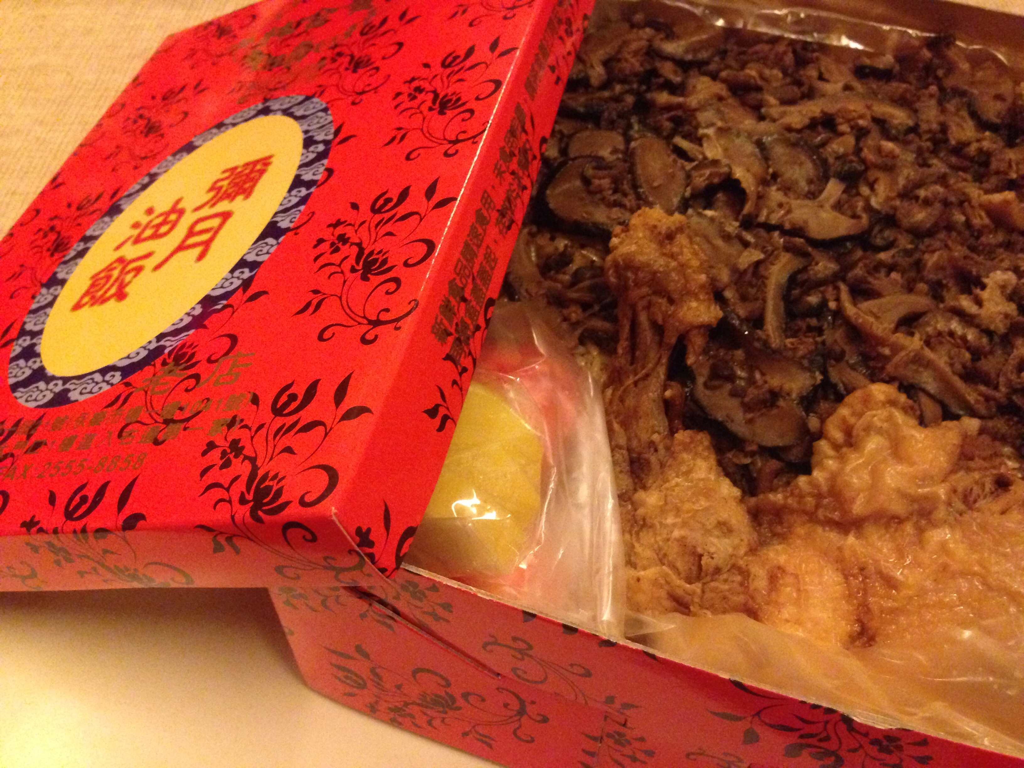 彌月油飯, 林合發油飯, 台北